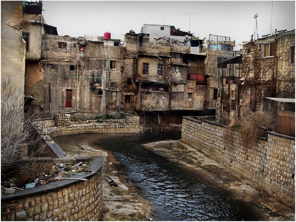 حي من احياء دمشق القديمة